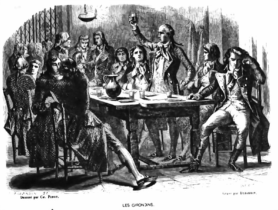 Les agapes des Girondins, à la veille de leur exécution